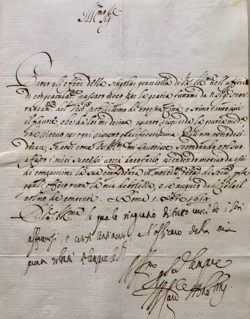 Lettera a Firma del Cardinale Pietro Vito Ottoboni Datario della Corte Pontificia E futuro Papa Alessandro VIII inviata ad un destinatario non specificato Lettera inviata da Roma, il giorno 5 Dicembre 1654 All'interno il Cardinale Ottoboni riferisce al destinatario informazioni di carattere personale.